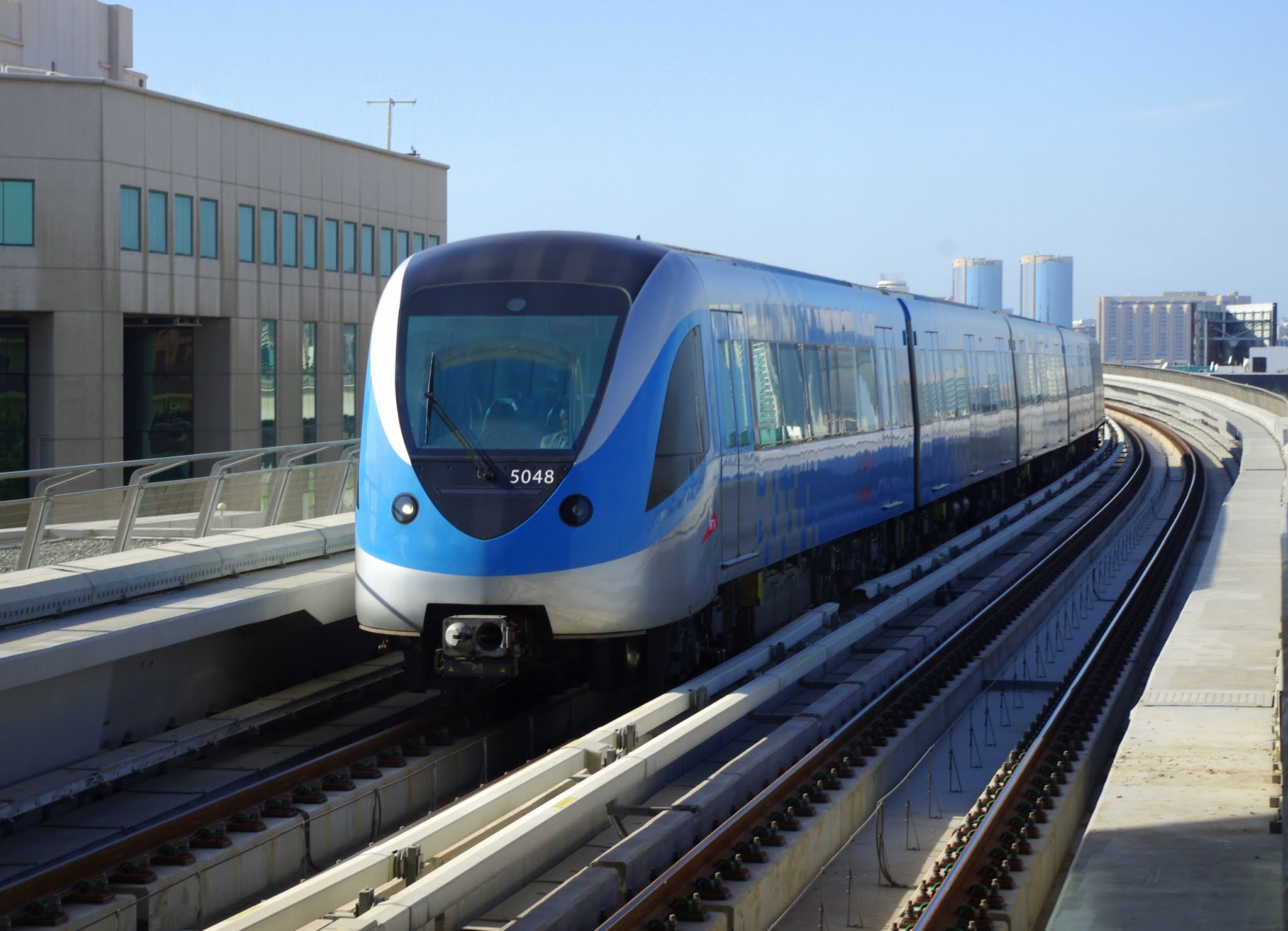 Dubai Metro